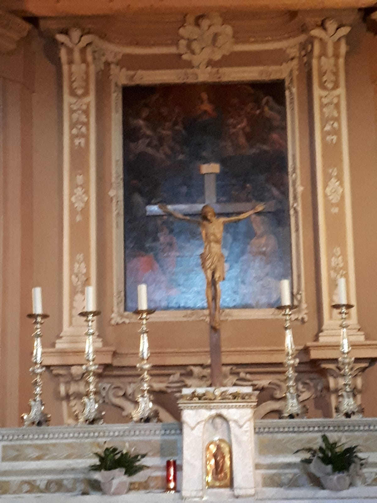 Il quadro dell'assunta con gli angoli scolpiti da Ermanediglio Lippi